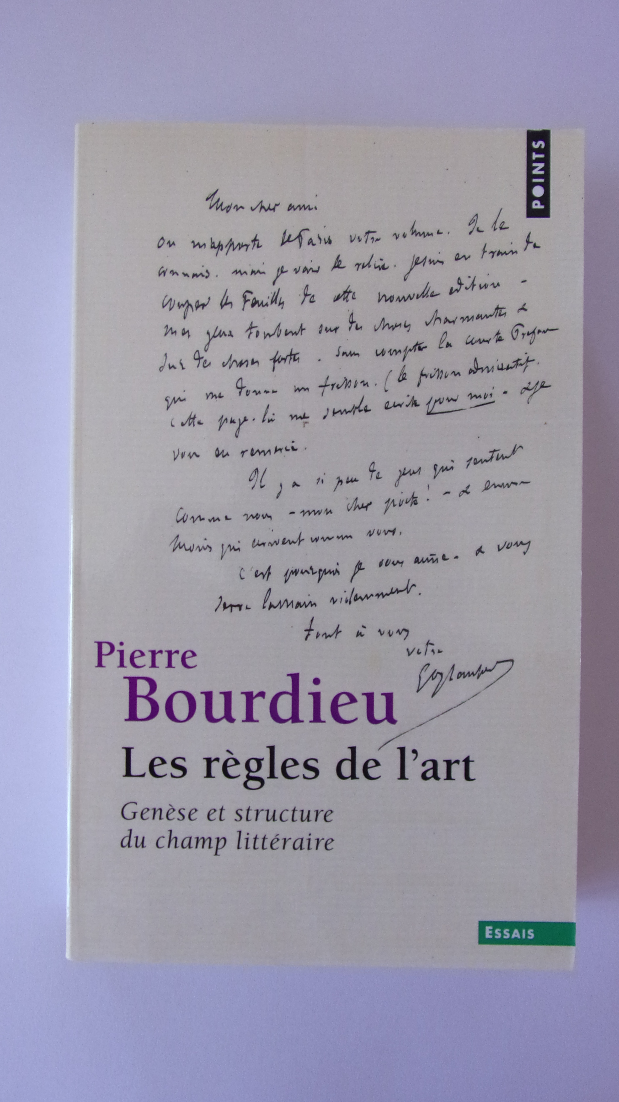 Les règles de l'art - Pierre Bourdieu, avec reproduction d'un écrit de Flaubert à un de ses amis.